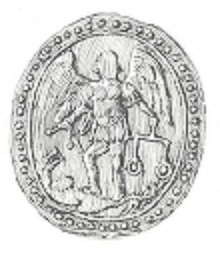 Міська печатка Клеваня з документу від 1777 року. Розмір: 39X33 мм